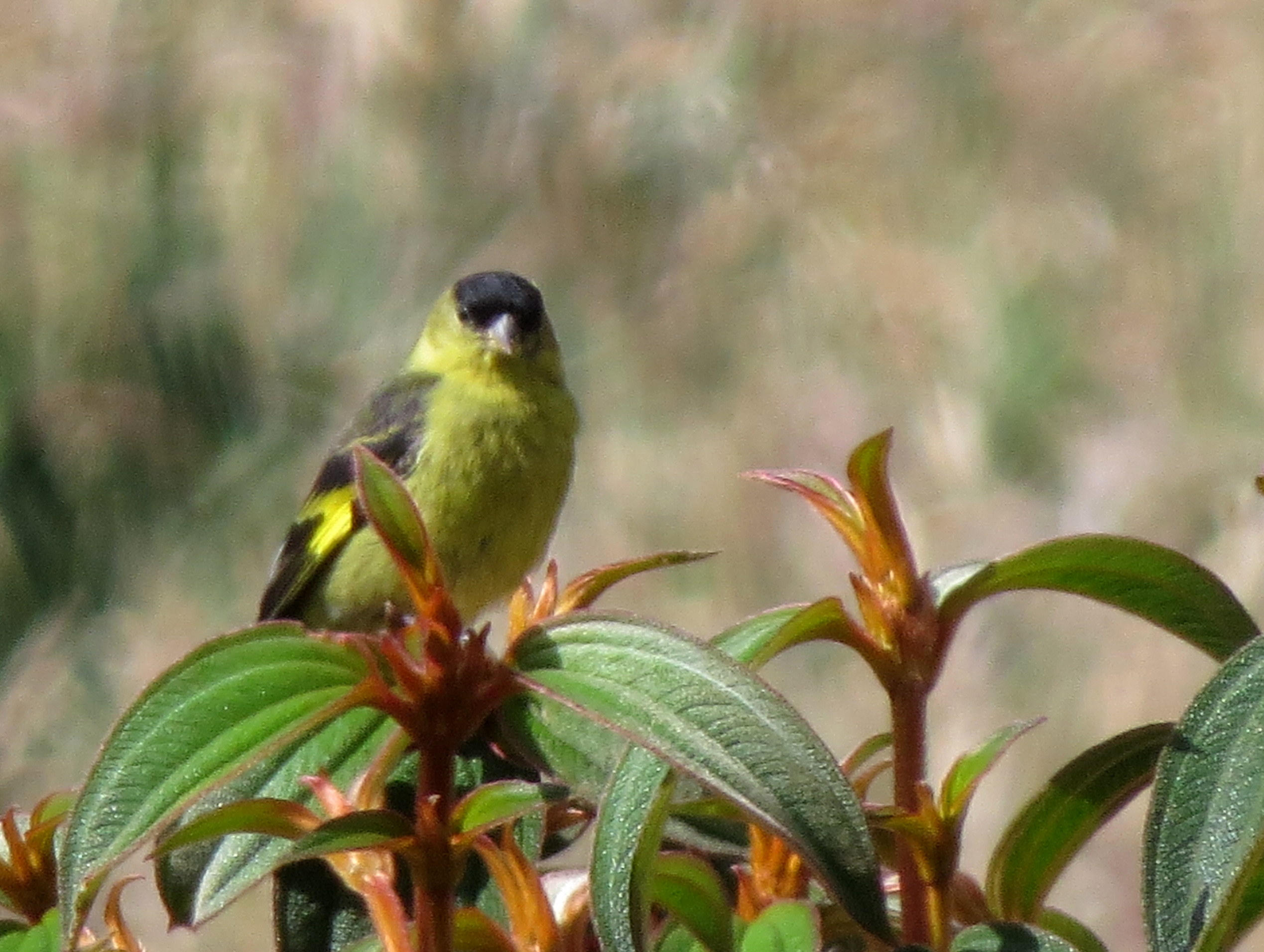 Sporagra spinescens (Jilguero andino)